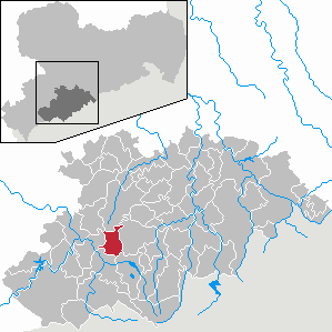 Grünhain-Beierfeld im Erzgebirgskreis, Sachsen